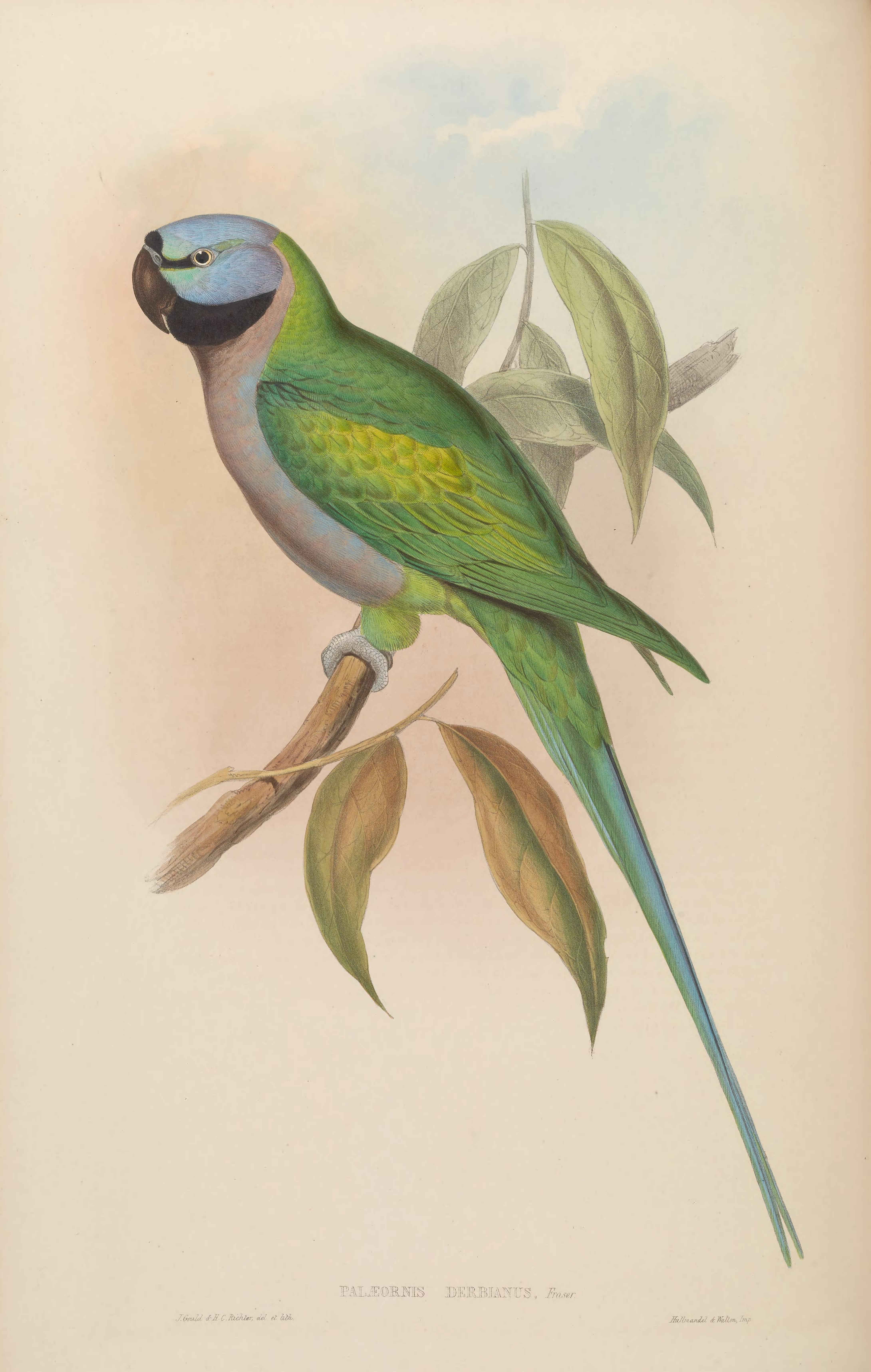 Palaeornis derbianus = Psittacula derbiana[1]